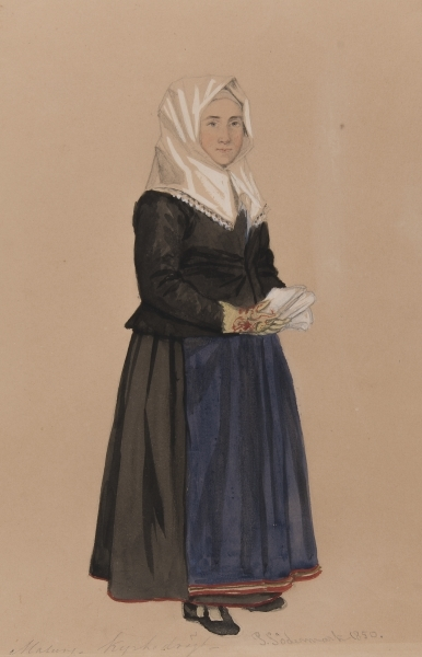 "Malung, Kyrkdrägt" Kvinna i kyrkdräkt. Akvarell av P Södermark 1850. Depicted place: Malung (Ort), Q10576235 (Q10576235)